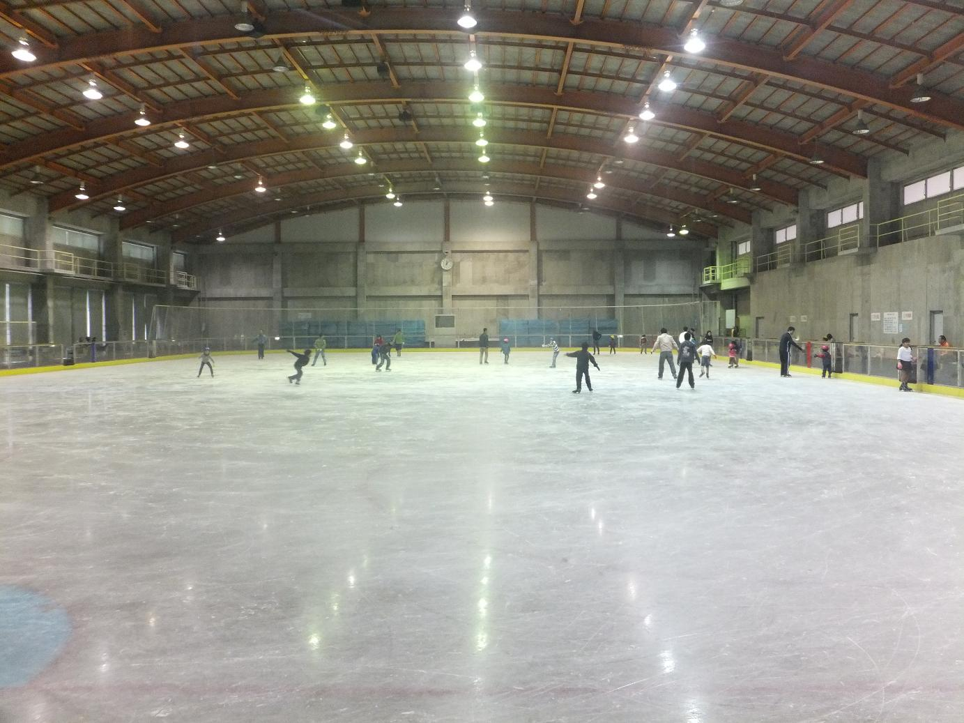 香川県三木町 トレスタ白山アイスアリーナ